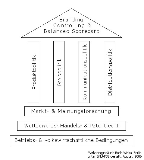 Schaubild Marketinggebäude, Eigene Schöpfung 1996 für Seminare der Außendienstakademie/Koblenz, nicht unerhebliche Schöpfungshöhe, erstes Schaubild weltweit zum Modell eines integrierten Marketing, welches nicht nur den Marketing-Mix focussiert, sondern ein umfeldbezogenes Selbstverständnis im Marketing postuliert. Charakter als Tempel ist untrennbarer Bestandteil des Bildes, um die Bedeutung innerhalb der BWL zu symbolisieren, keine Balken-Grafik, nicht beliebig veränderbar, Nutzung wie ein Foto gem. Urheberrecht nur als Gesamtschöpfung zulässig.